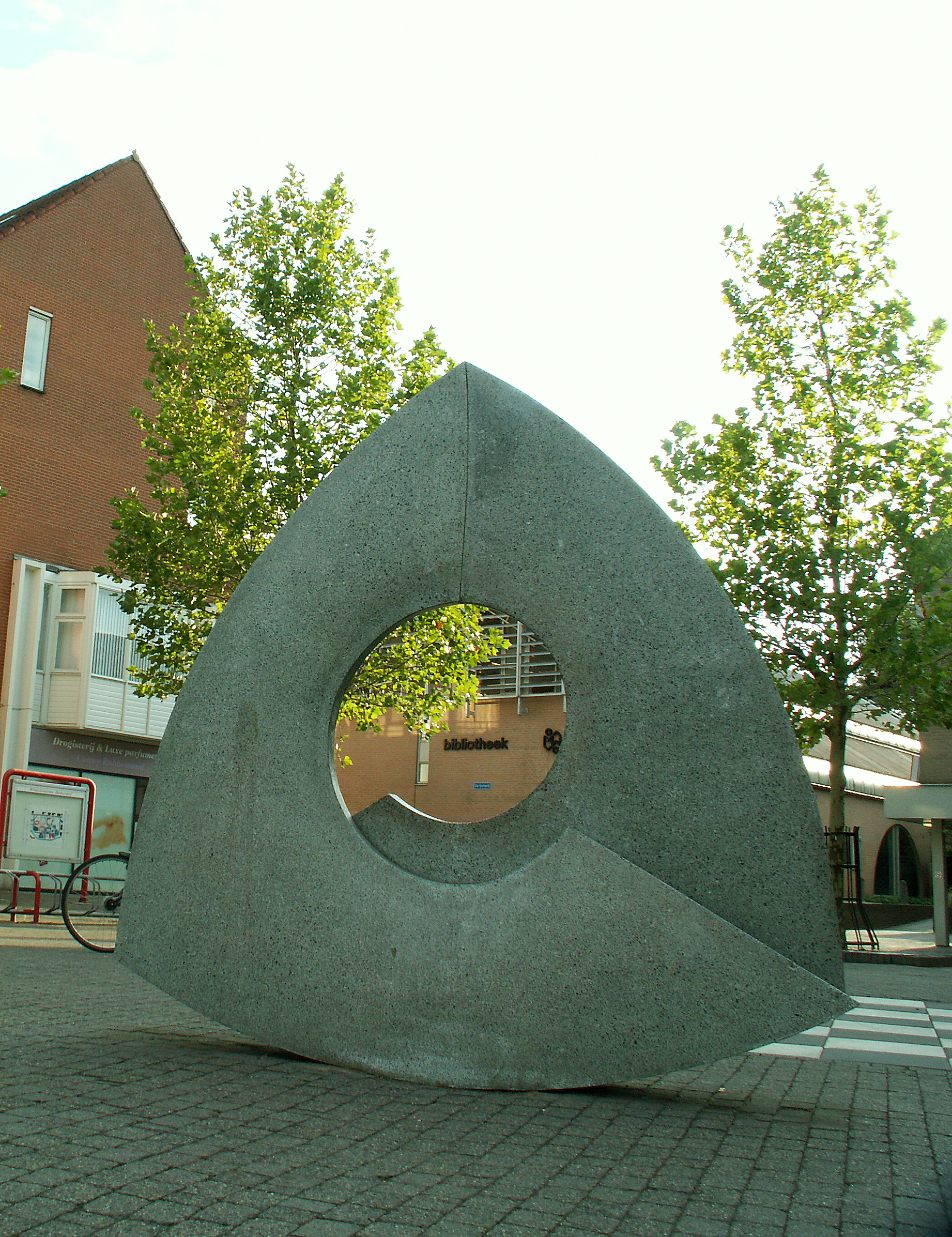 Terrazzo kunstwerk, 't Erf, Leusden. Zonder titel, door Gertjan van der Stelt